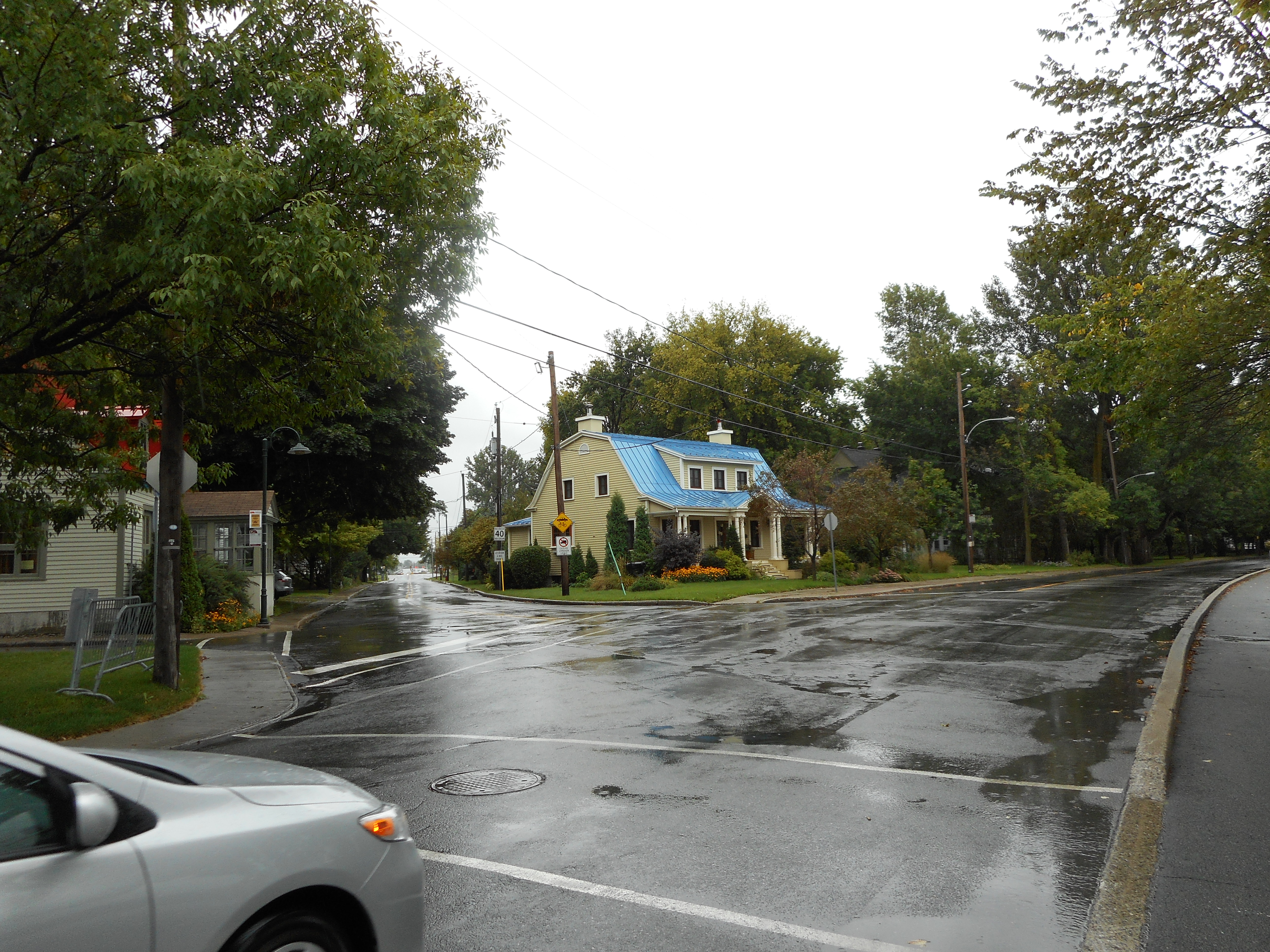 444, boulevard Marie-Victorin, Boucherville Fait partie de l'aire de protection de la maison La Chaumière